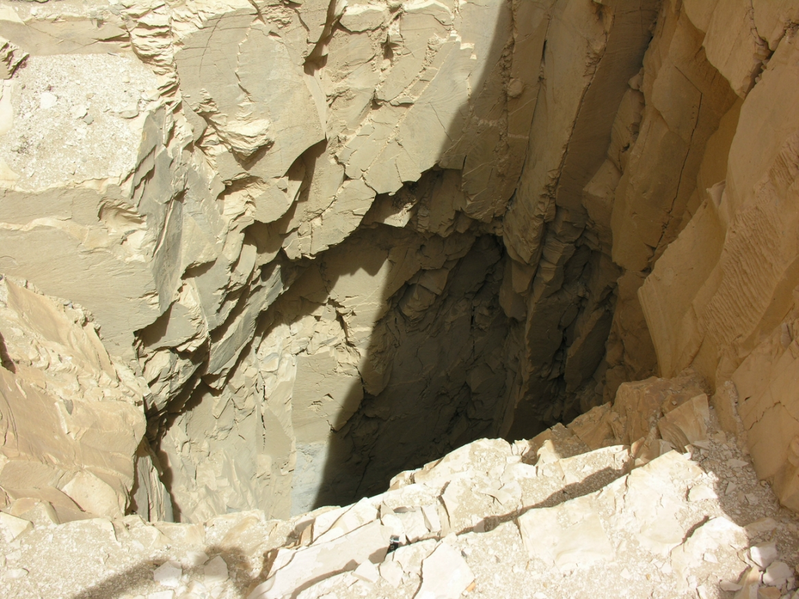 DB320 TT320 Deir El Bahri Cache Tomb